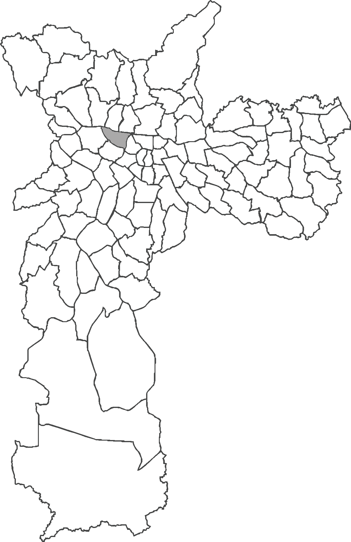 Localização do distrito da Barra Funda no município de São Paulo.